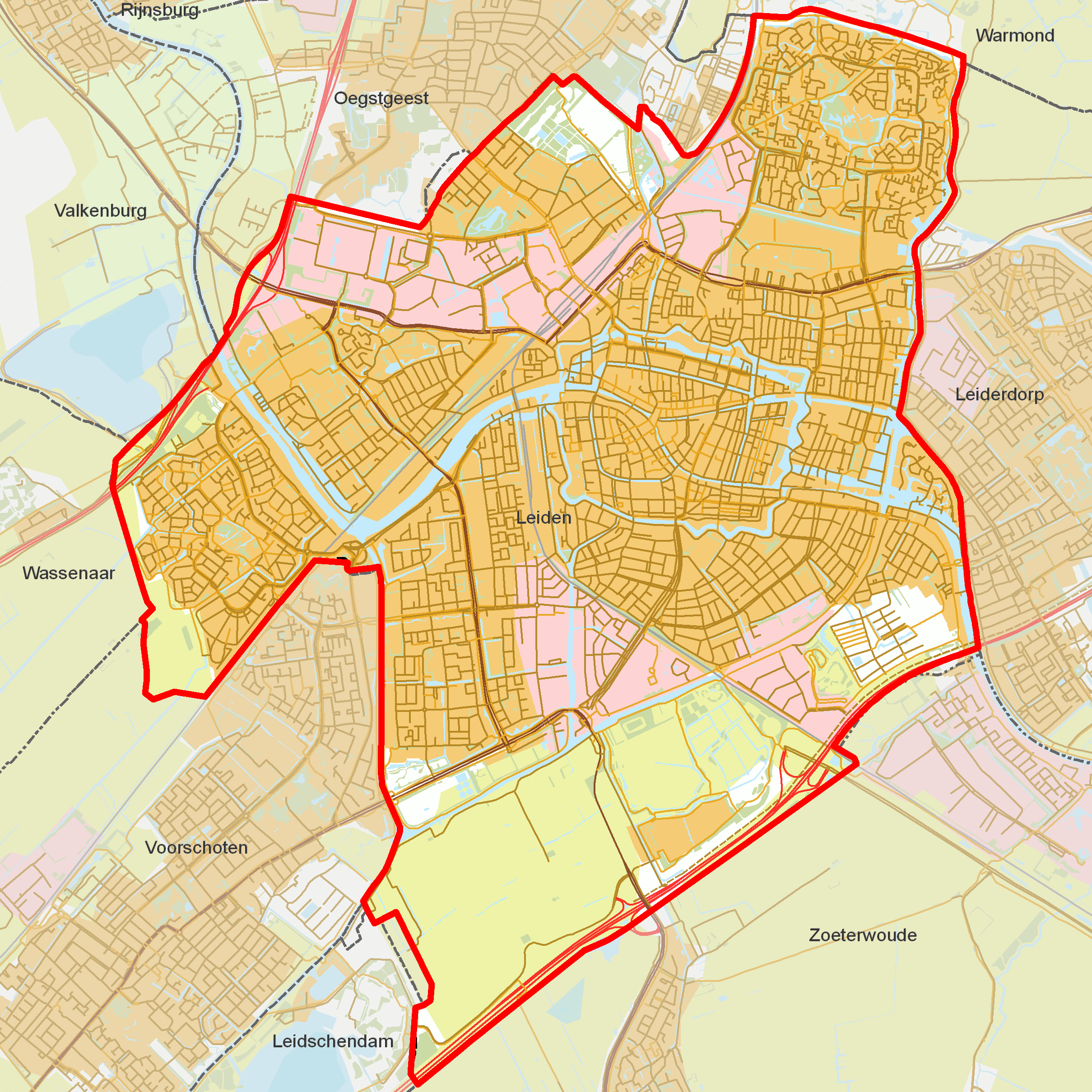 BAG woonplaatsen - Gemeente Leiden.png